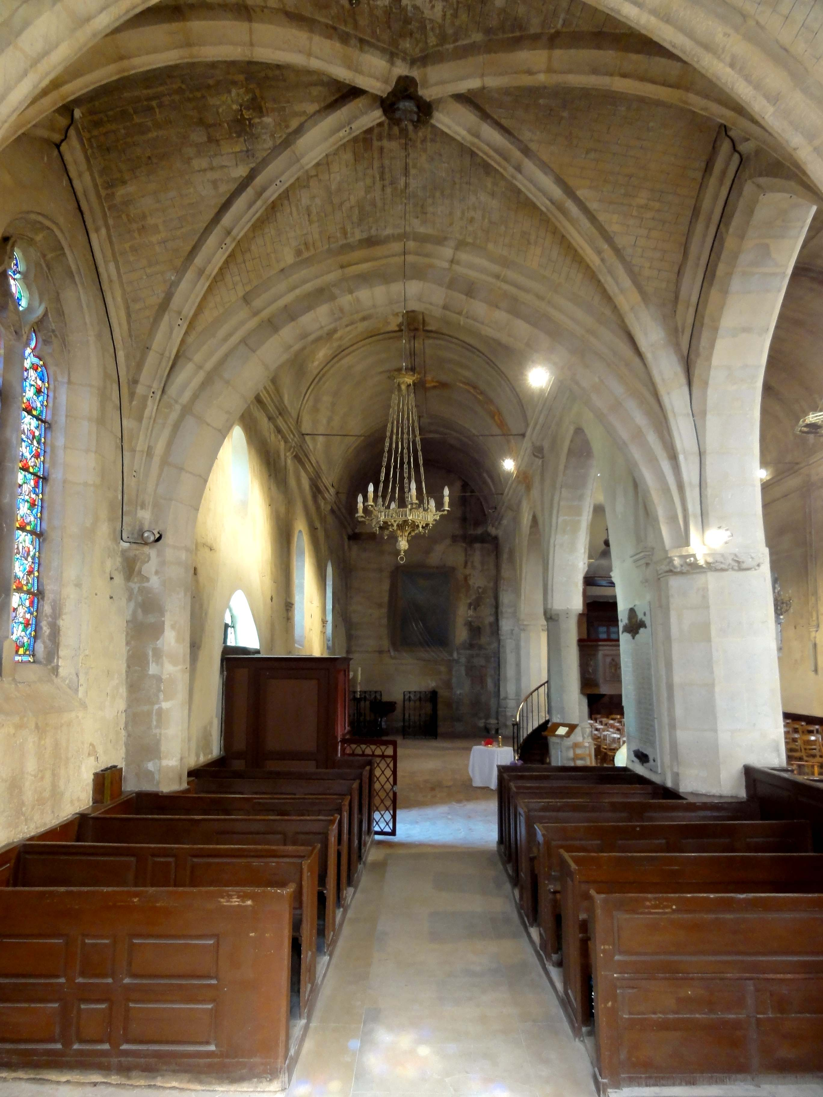 Collatéral sud du chœur, vue vers l'ouest.